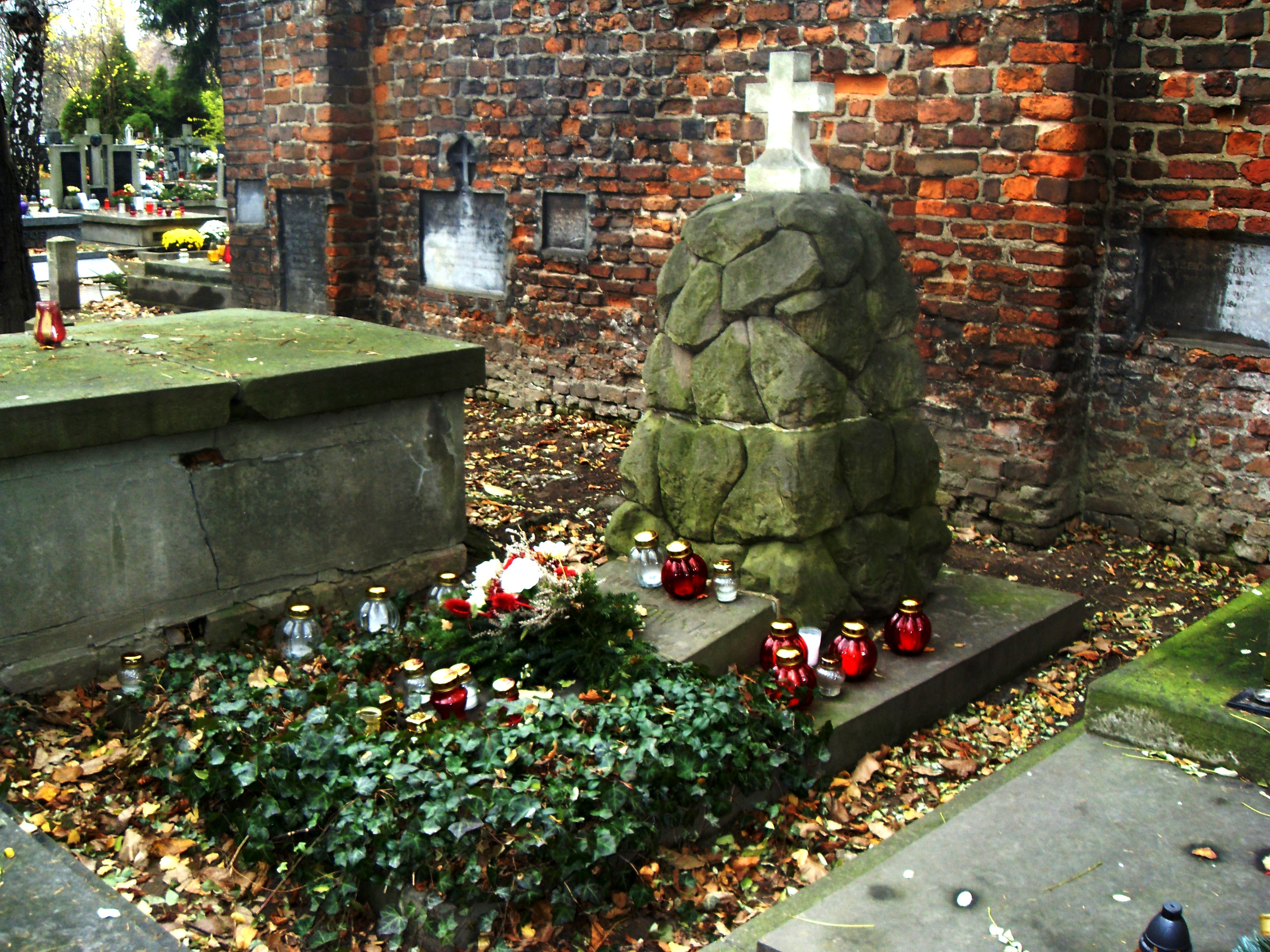 Grobowiec Apolla Korzeniowskiego - ojca Josepha Conrada, Kraków Cmentarz Rakowicki